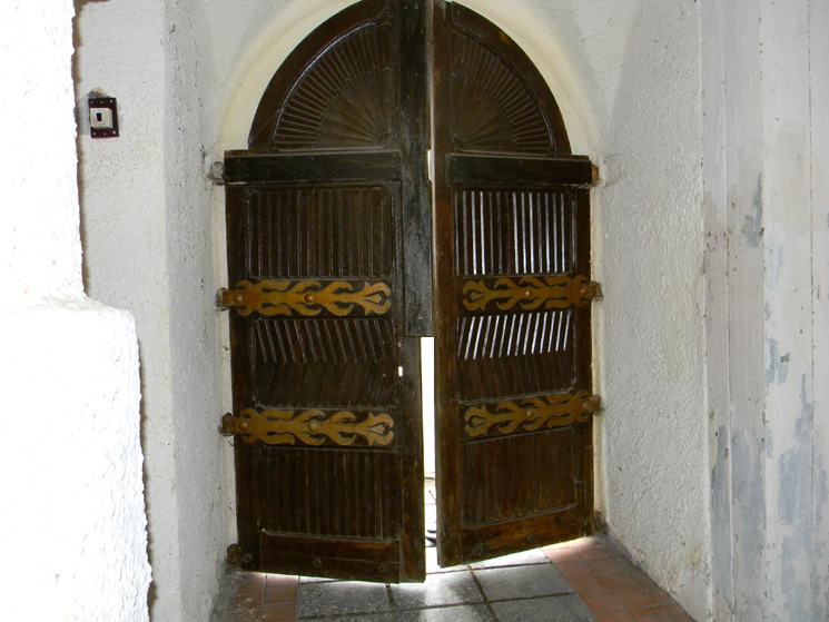 Нясвіж. Былы кляштар бенедыкцінак